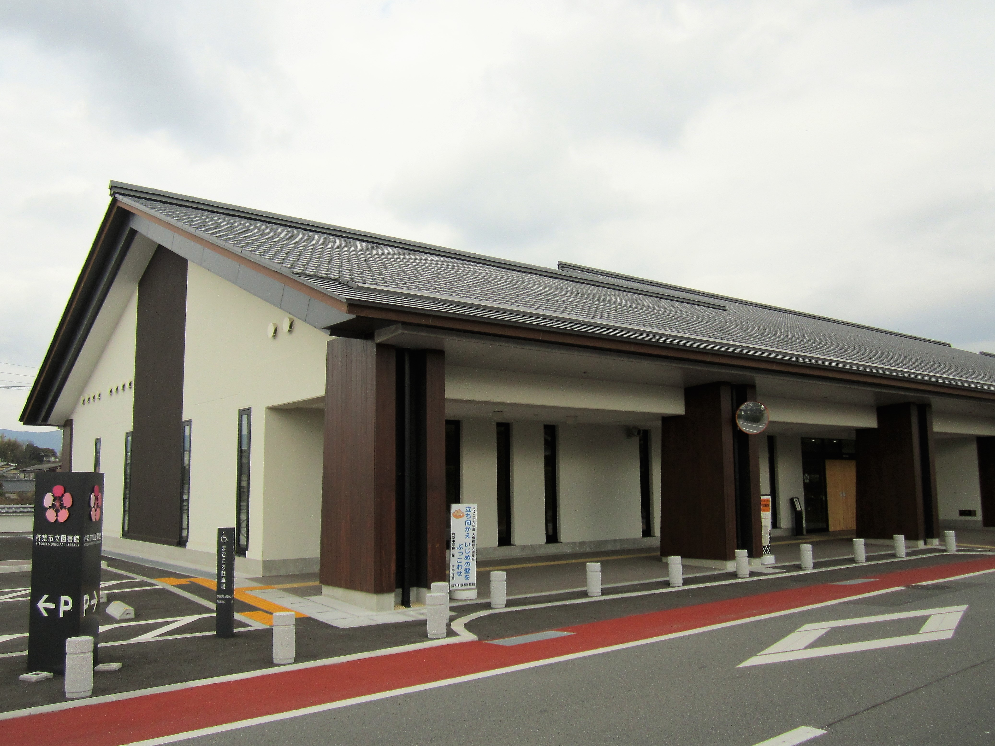 杵築市立図書館 本館（杵築市大字南杵築） Canon PowerShot A2200